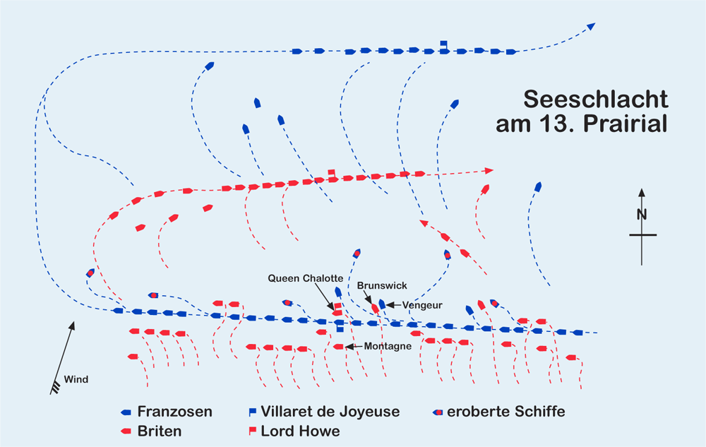 Plan zur Seeschlacht am 13. Prairial (engl.: Glorious First of June)